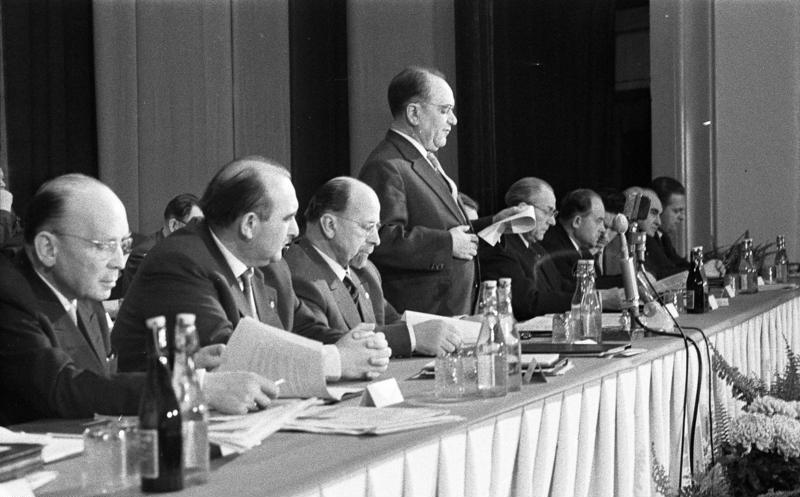 ADN-ZB / Quaschinsky / 3.11.1958 Chemiekonferenz eröffnet Am 3.11.1958 begann im Klubhaus der Leune-Werke eine 2tägige Chemiekonferenz des ZK der SED und der Staatlichen Plankommission über das Chemieprogramm des V. Parteitages. Über 1000 Arbeiter, Angestellte und Angehörige der Intelligenz der Chemischen Industrie sowie Mitarbeiter des Staatsapparates und Vertreter des Bauwesens und des Maschinenbaues begrüßten in ihrer Mitte mit stürmischen Beifall die Mitglieder und Kandidaten des Politbüros und die Sekretäre des ZK der SED unter Führung von Walter Ulbricht und Otto Grotewohl. U.B.z.: Während der Referates von Bruno Leuschner, Vorsitzender der Staatlichen Plankommission und Mitglied des Politbüros der ZK der SED. Von links nach rechts: Prof. Dr. Dr, h.c. Erich Correns, Präsident des Nationalrats der Nationalen Front, Erich Apel, Leiter der Wirtschaftskommission beim Politbüro des ZK der SED; Walter Ulbricht, Erster Sekretär des ZK der SED; Bruno Leuschner; Otto Grotewohl, Ministerpräsident. Abgebildete Personen: Ulbricht, Walter: Staatsratsvorsitzender, Erster Sekretär des Zentralkomitees (ZK) der SED, Vorsitzender des Nationalen Verteidigungsrates, DDR (GND 118625179) Correns, Erich Prof. Dr.: Staatsrat, Präsident der Nationalen Front, Gesellschaft für deutsch-sowjetische Freundschaft (DSF), Forschungsrat, DDR (GND 107634414) Apel, Erich Dr.: Vorsitzender Staatliche Plankommission, stellvertretender Ministerratsvorsitzender, DDR (GND 123044030) Leuschner, Bruno: Staatsrat, Vorsitzender der Staatlichen Plankommission, SED, KPD, DDR (GND 118572229 Grotewohl, Otto: Ministerpräsident, stellvertretender Staatsratsvorsitzender, DDR (GND 118542680)